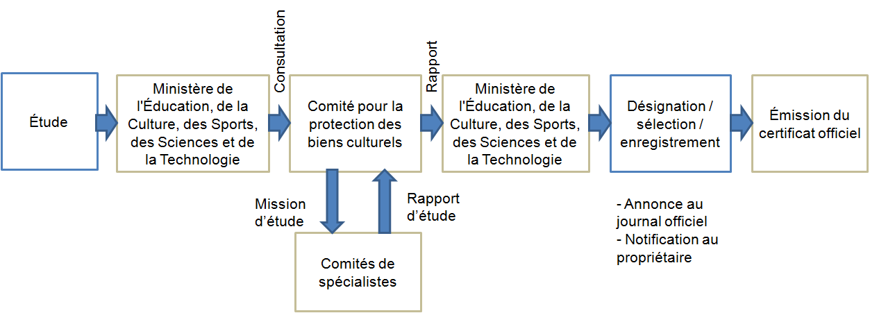 Processus décrivant la sélection/désignation/enregistrement des propriétés culturelles du Japon. Source : Document de l'Agence pour les affaires culturelles (dépendant du ministère de l'Éducation, de la Culture...).